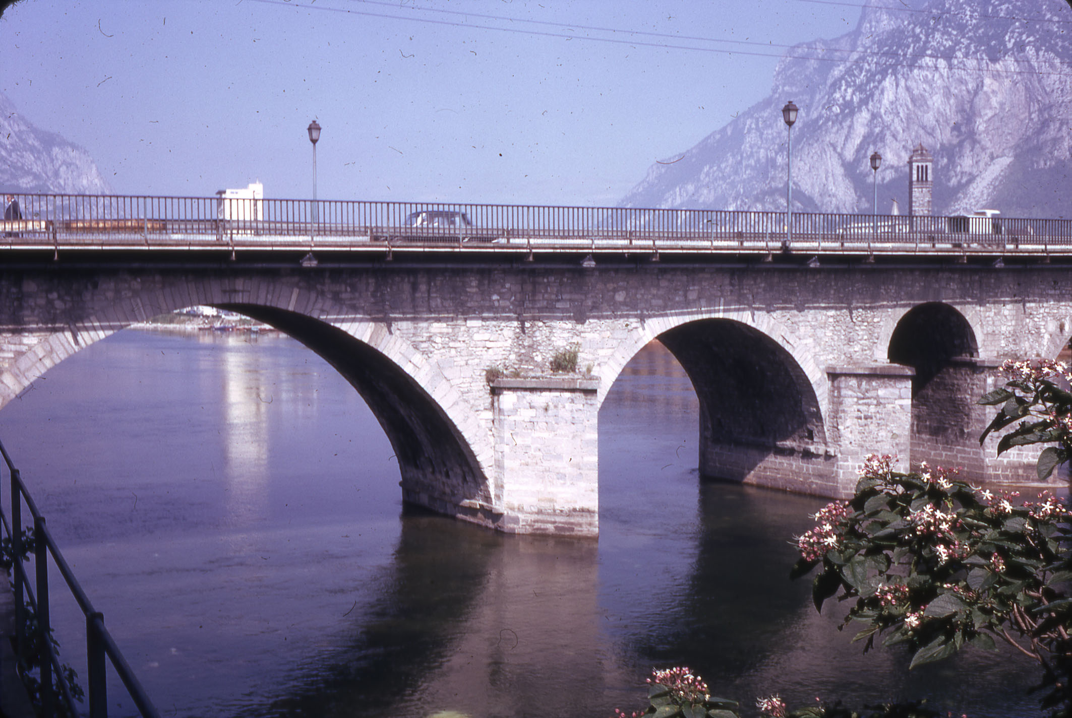 Lecco - ponte Azzone Visconti (comunemente chiamato ponte vecchio). Archivio Pietro Pensa, fondo fotografico, selezione di Elvia Redaelli, 2008, n. 36.